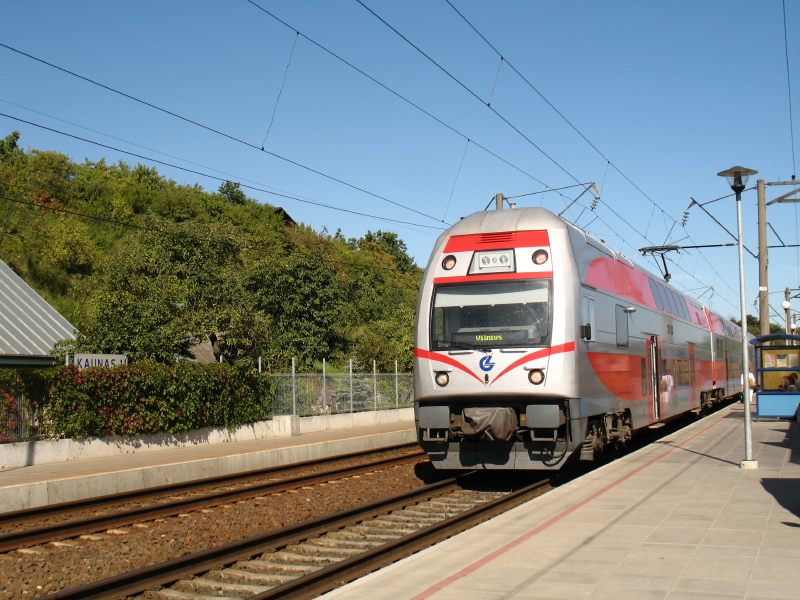 Laikinoji geležinkelio stotis Petrašiūnuose, Kaunas.